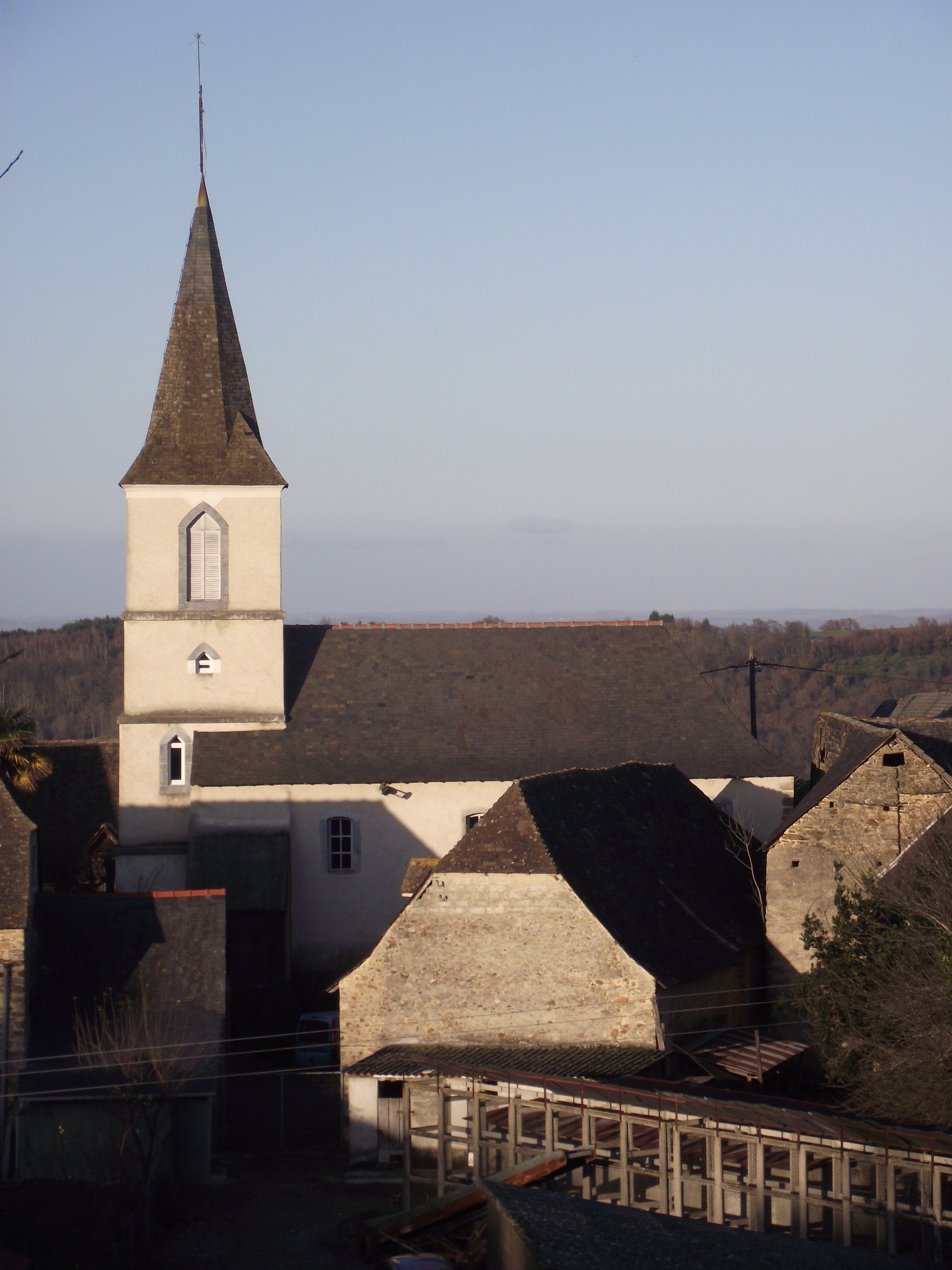 Église Saint-Laurent de Layrisse (65)